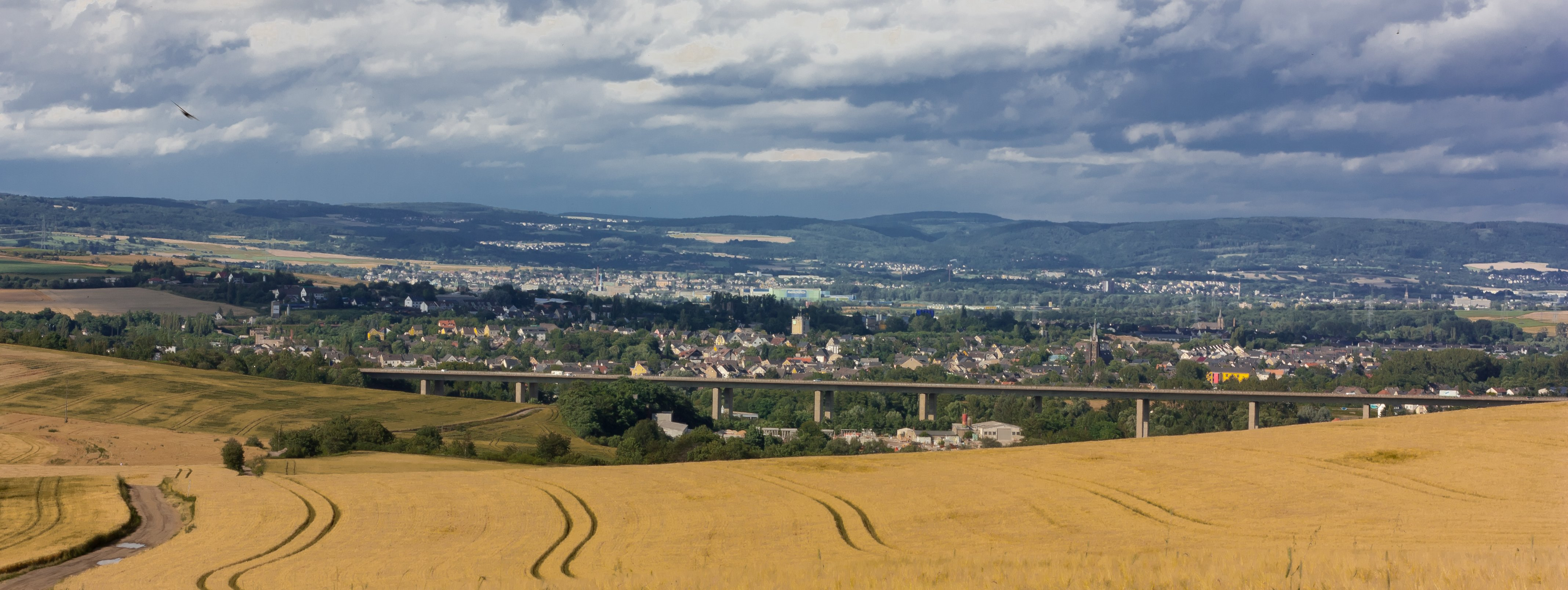 Plaidt, im Kreis-Mayen-Koblenz